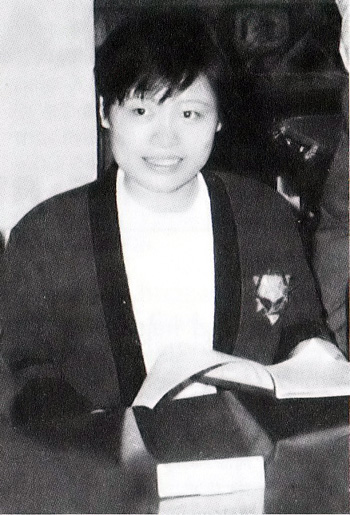 GM Xie Jun podczas obrad Kongresu FIDE, Kurytyba 17-24 listopada 1993.